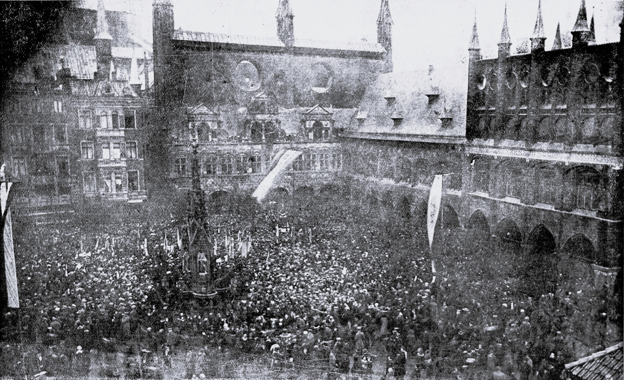 Begrüßungsfeier des aus dem Felde zurückgekehrten Regiments Lübeck auf dem Marktplatz am 30. November 1918. Vor der Börse steht ein Podest. Auf dem Podest befinden sich mit Fehling, Dimpcker, Retyfeldt, Stelling und v. Werder die fünf Redner der Veranstaltung.